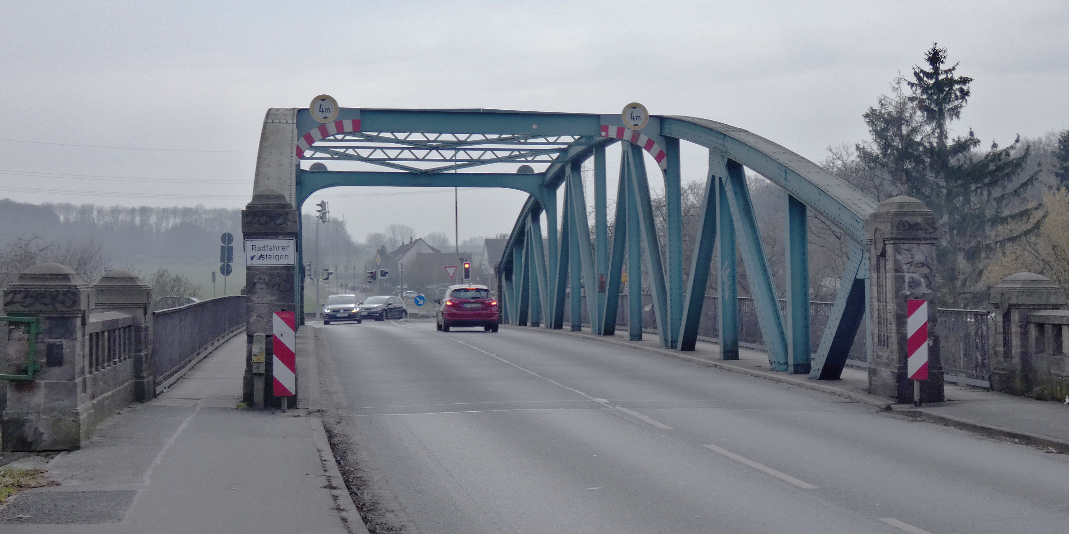 Brücke über den Stichkanal Linden am Südrand von Letter in Niedersachsen. Für Autofahrer dein Nadelöhr auf dem Weg sowohl nach Süden als auch zur als "Letters gute Verkehrsanbindung" gepriesenen Bundesstraße 441.